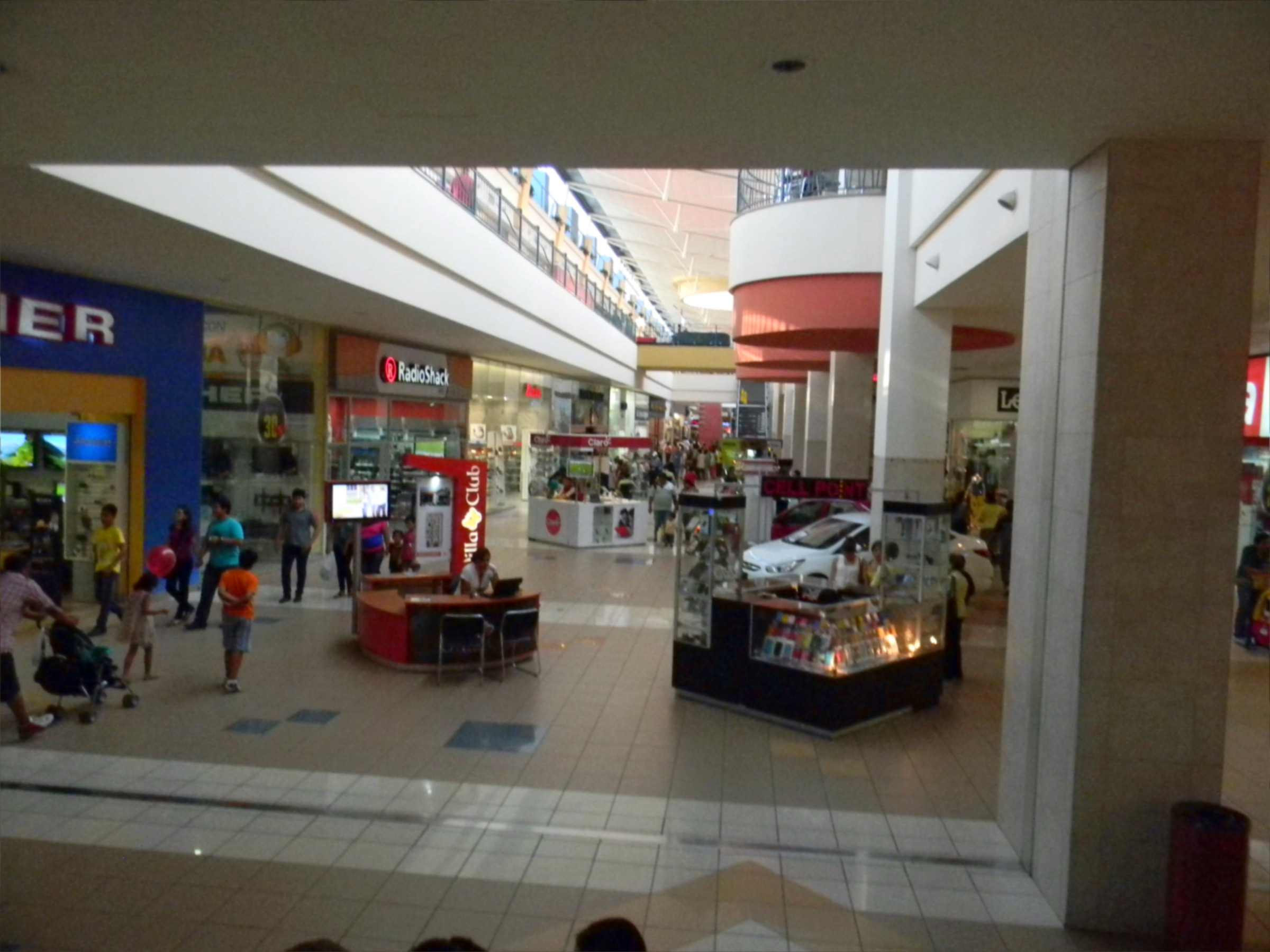 Interior del centro comercial Mall del Sur en Guayaquil